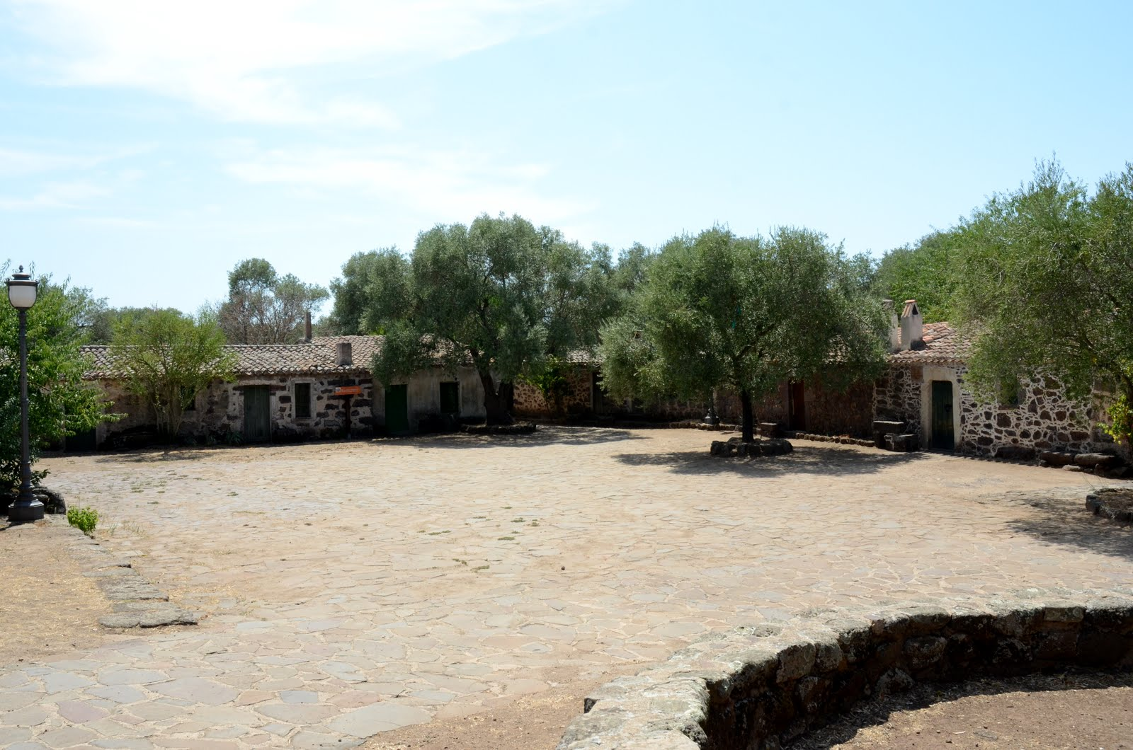 Santa Cristina, Pozzo Sacro. Muristenes. Piccole abitazioni dette muristenes o cumbessias, edificate attorno alla chiesa campestre di Santa Cristina a partire dal XVIII secolo come luogo dove i fedeli si riunivano in preghiera nei nove giorni precedenti la festa.